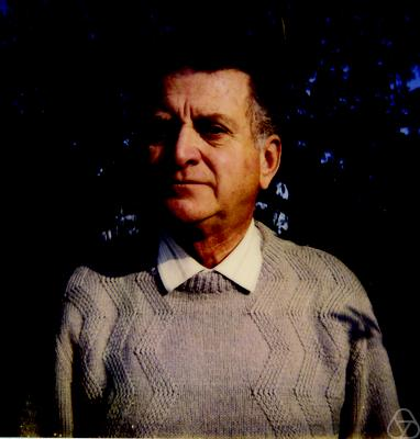 Foto di Giuseppe Tallini